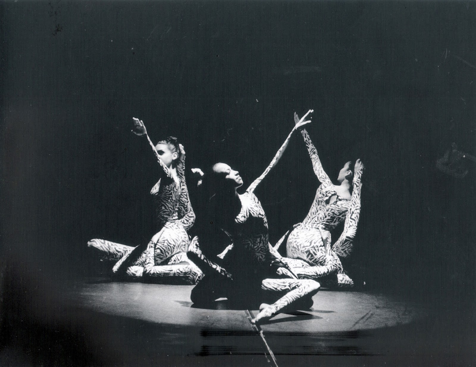 Presentación de la Compañía de Danza Contemporánea "Danzart"